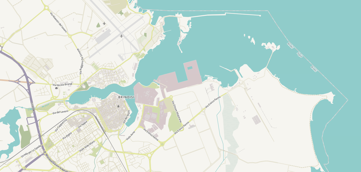 Mappa di Brindisi This map may be incomplete, and may contain errors. Don't rely solely on it for navigation.